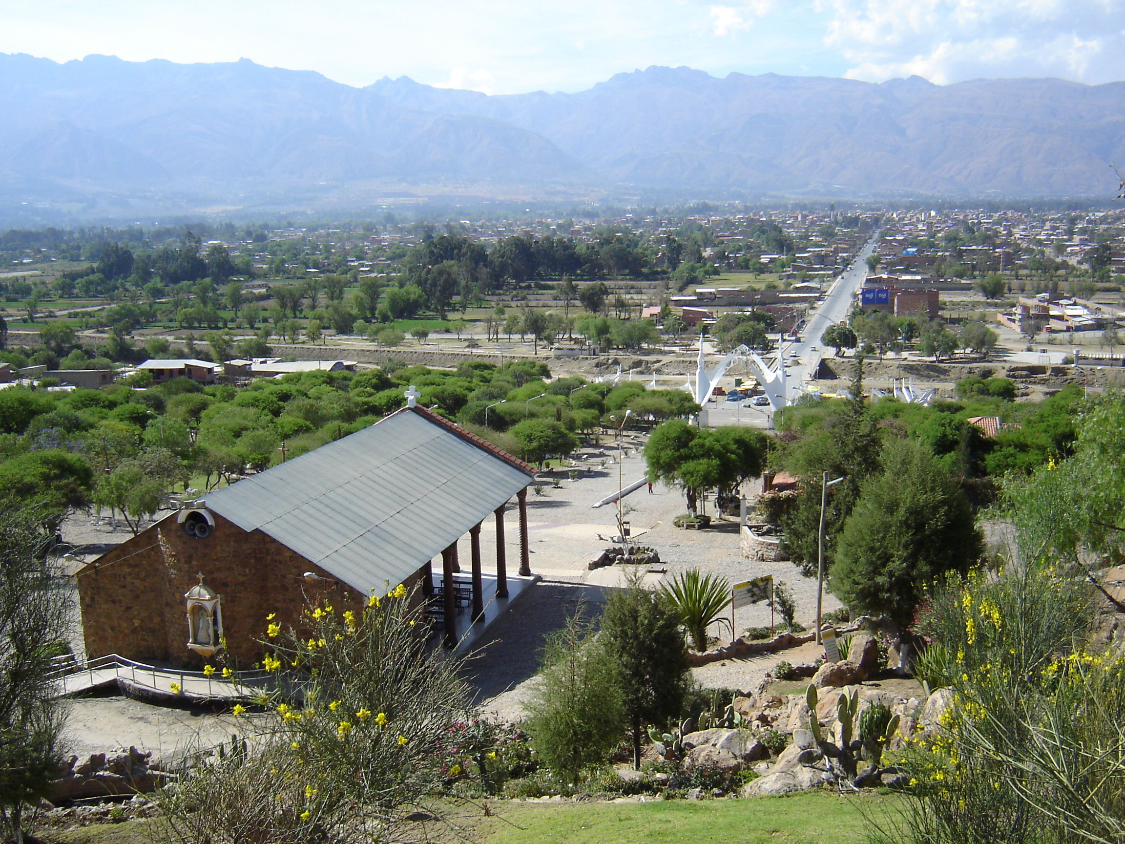 Vista del Calvario de la Virgen María de Urqupiña y del valle de Quillacollo. Runa Simi: Juq qhawariy Urqupiñamanta Llump'aq Mariyaq kalwariunta Killaqulluq qhichwantawan.